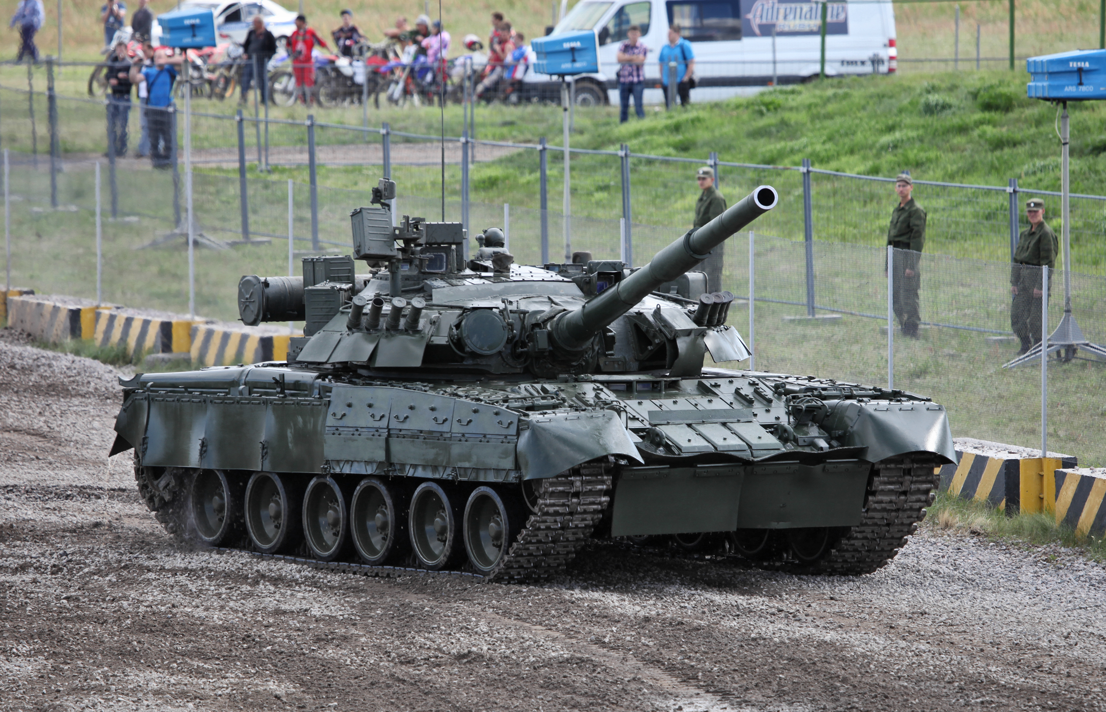 Основной боевой танк Т-80У (T-80U MBT)